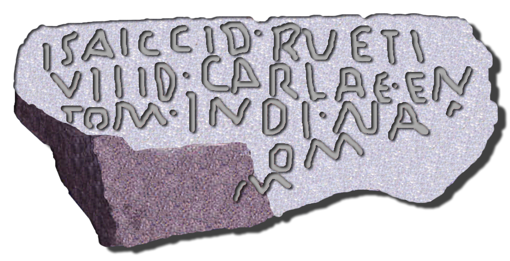 Reproducción de inscripciones lusitanas de Arroyo de la Luz (Cáceres) Inscripcion: ISAICCID. RVETI. PVPPID. CARLAE. EN ETOM. INDI. NA(.) (....) CE. IOM. M Autor de la reproducción: J.M de la Osa